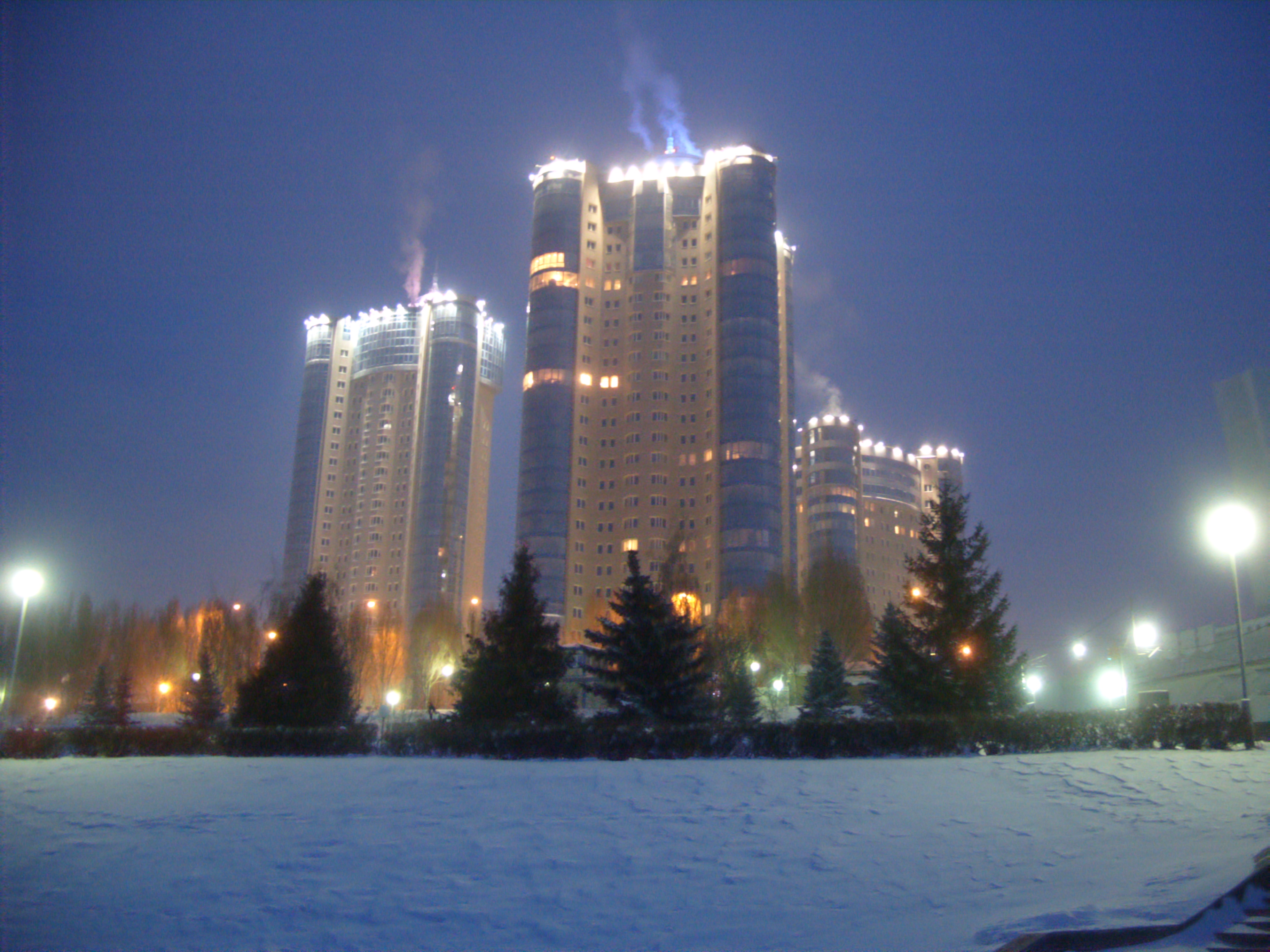 Samara, Russia